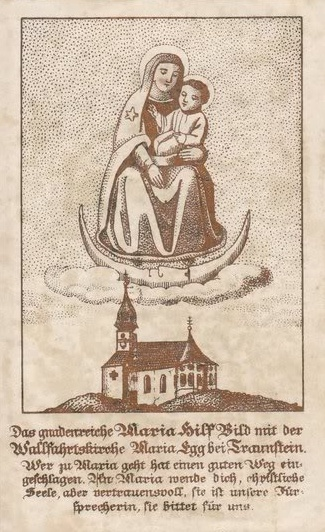 Wallfahrt Maria Eck bei Traunstein, Bayern